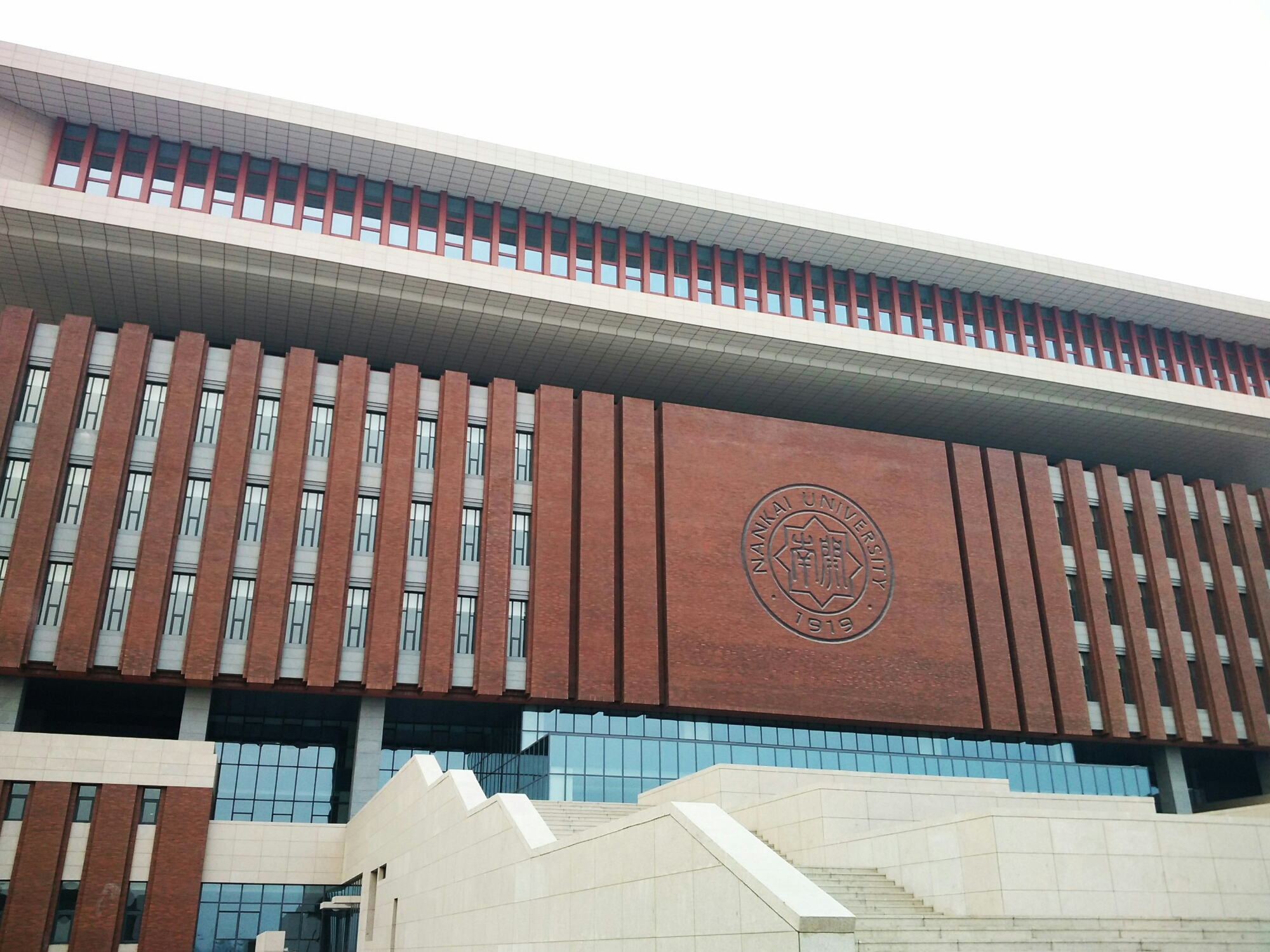 南开大学新校区图书馆